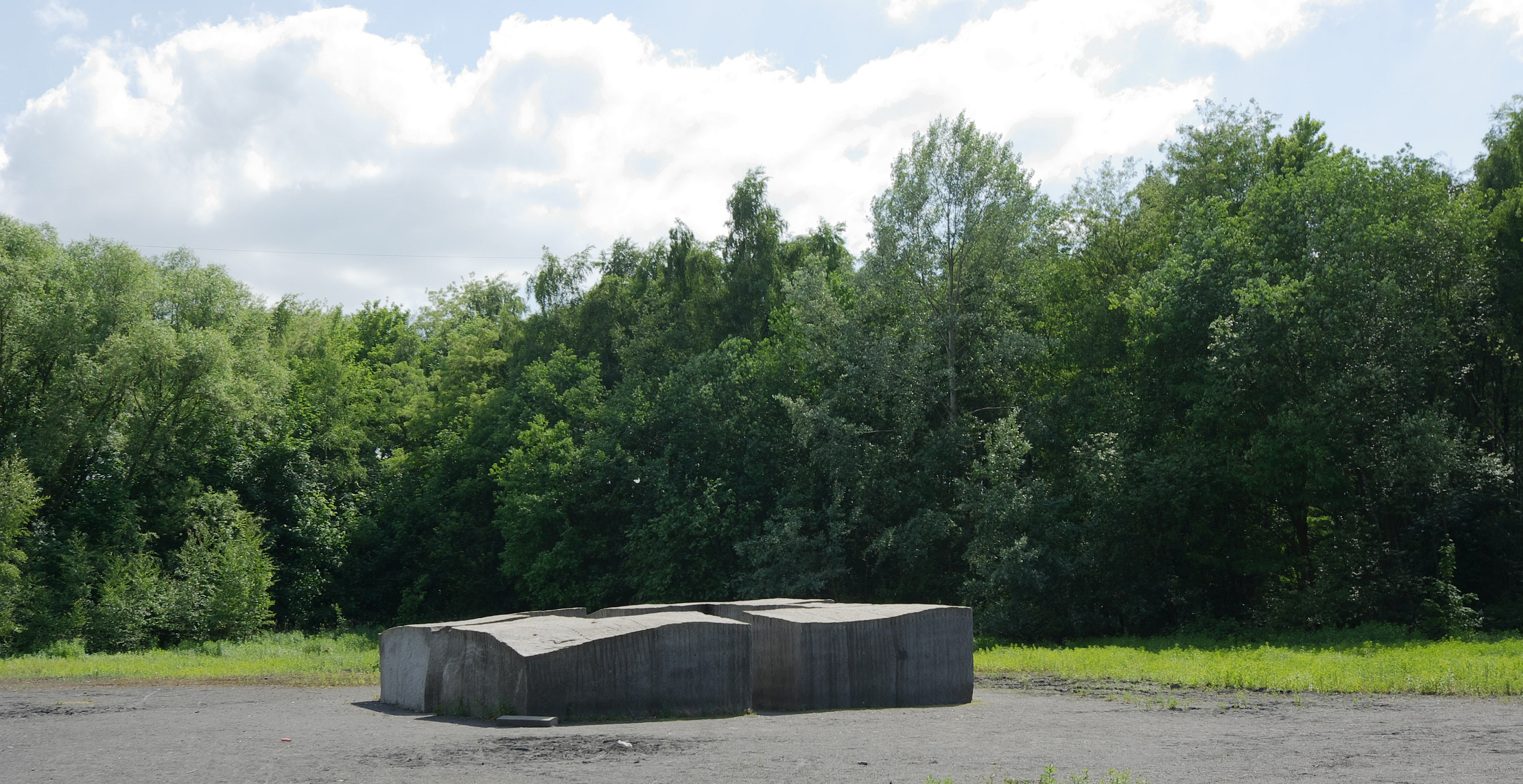 Skulptur von Ulrich Rückriem im Skulpturenpark Zeche Zollverein, Essen